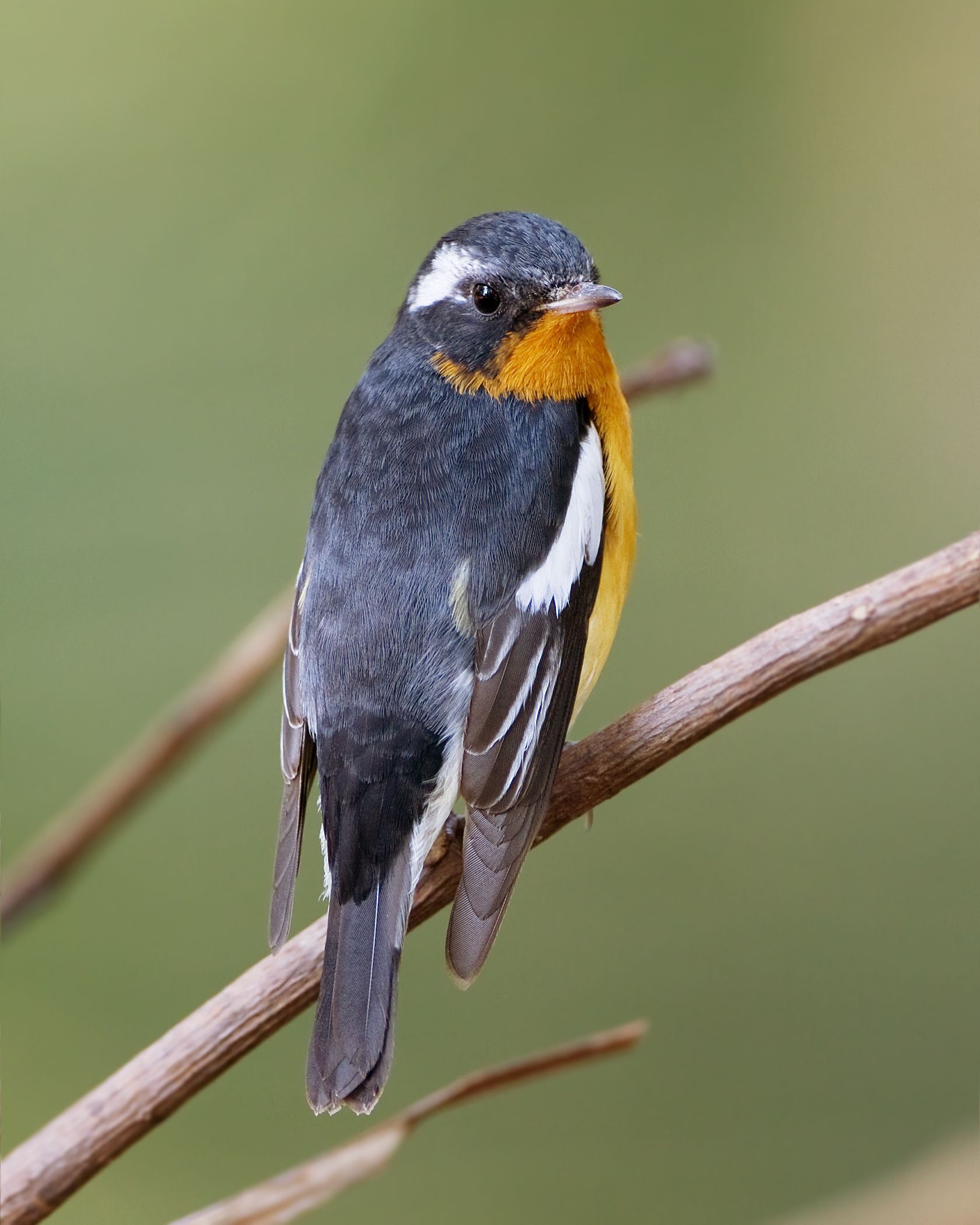 Mugimaki Flycatcher Ficedula mugimaki, Khao Yai National Park, Pak Chong, Thailand